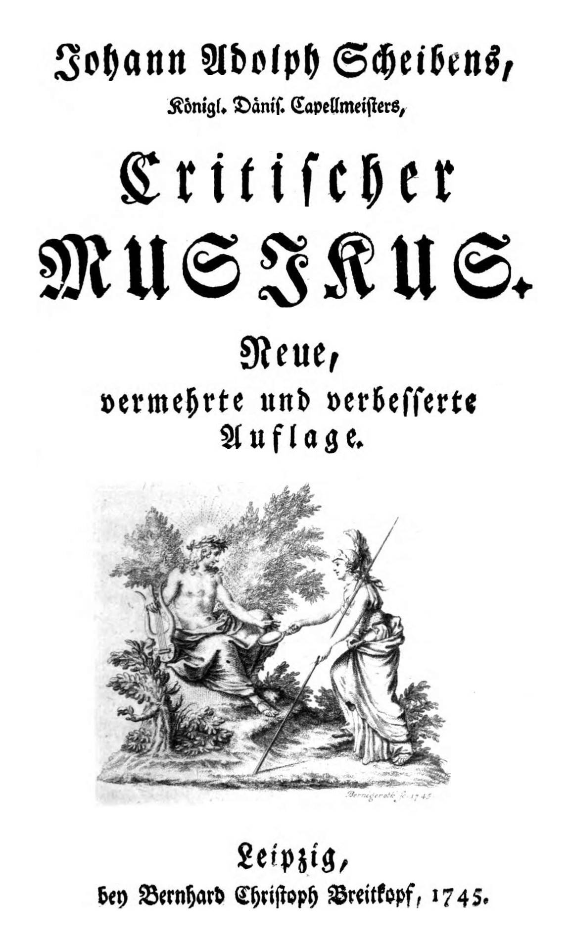 Titelseite der Zeitschrift / Title page of the periodical.